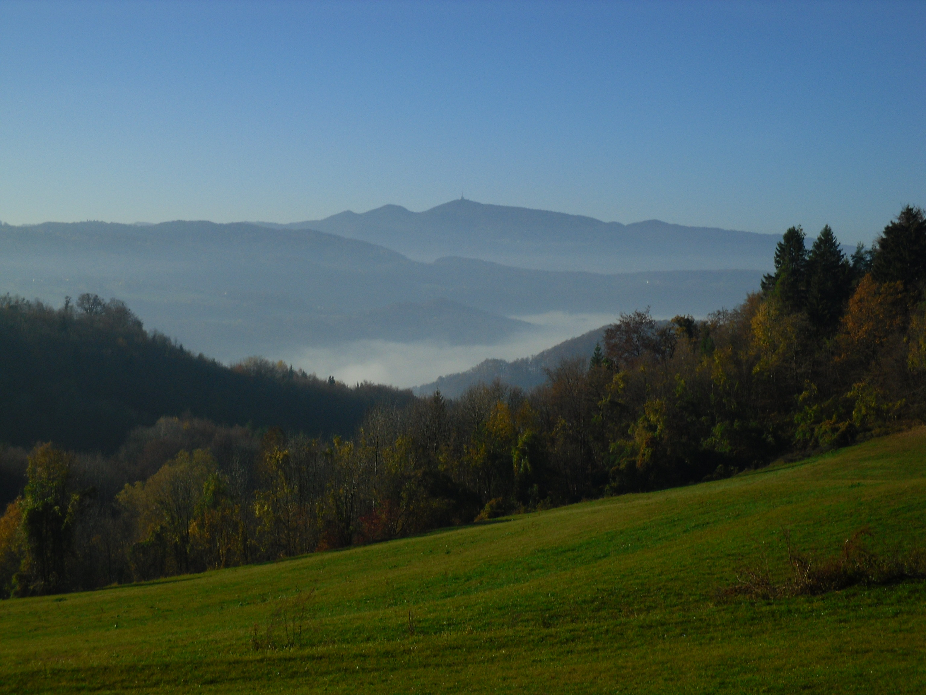 Govce - pogled proti Kumu